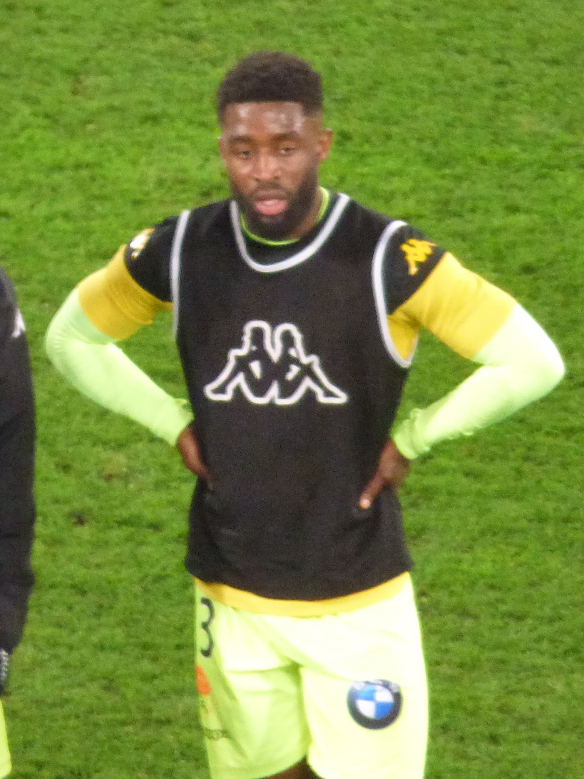 Stéphane Lambese avant le match RC Lens / US Orléans, comptant pour la vingt-huitième journée du championnat de France de football de Ligue 2 2019/2020, le 9 mars 2020.